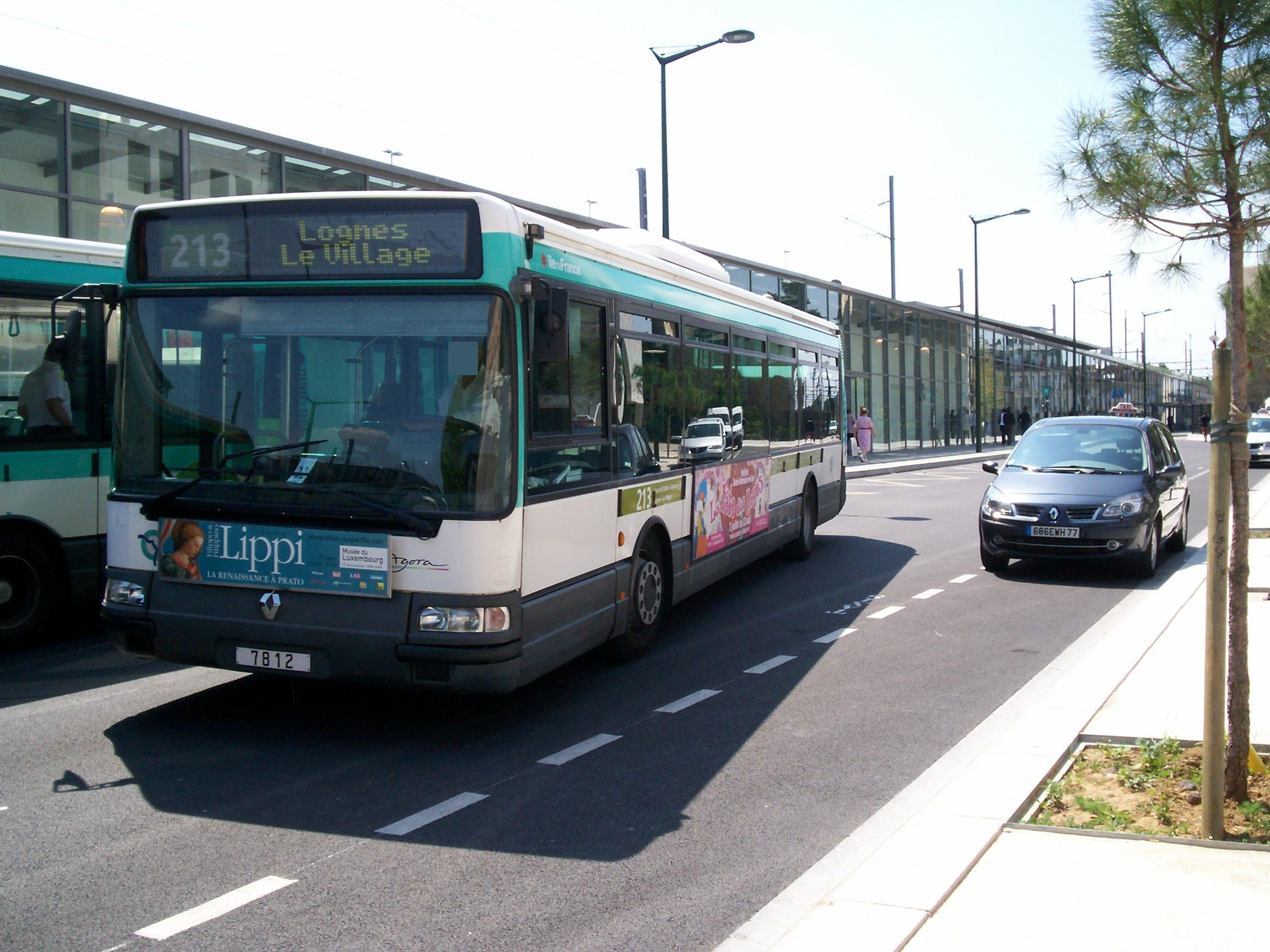 Bus 213 quittant le terminus de la gare de Chelles situé sur la nouvelle allée des transports